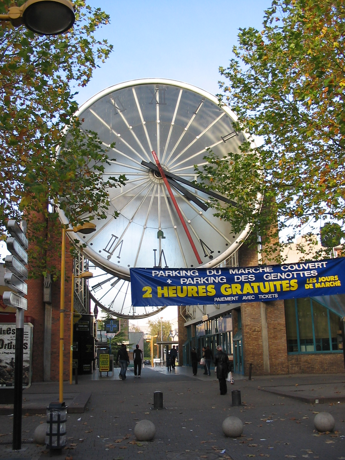 Place de l'Horloge devant la gare RER de Cergy-Pontoise (95). je suis l'auteur du cliché.